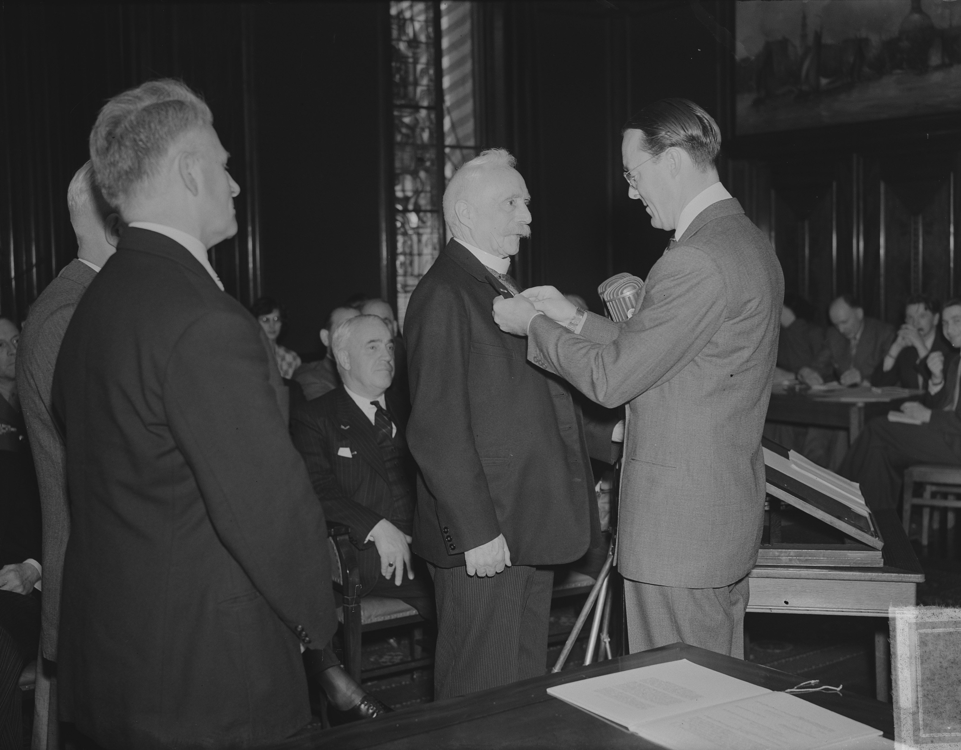 Collectie / Archief : Fotocollectie Anefo Reportage / Serie : [ onbekend ] Beschrijving : Prins Bernhard reikt te Amsterdam zilveren anjers uit. aan. K. ter Laan Annotatie : Kornelis ter Laan (Slochteren, 8 juli 1871 – Utrecht, 6 maart 1963) was een Nederlandse onderwijzer, taalkundige en politicus, die publiceerde als K. ter Laan. Hij was een bekend pleitbezorger van de Groninger taal en cultuur. Daarnaast was hij Tweede Kamerlid voor de Sociaal-Democratische Arbeiderspartij (SDAP) en burgemeester van Zaandam. (bron: Wikpedia) Datum : 25 juni 1951 Locatie : Amsterdam, Noord-Holland Trefwoorden : prijsuitreikingen Persoonsnaam : Bernhard (prins Nederland), Laan, Kornelis ter Fotograaf : Bilsen, Joop van / Anefo Auteursrechthebbende : Nationaal Archief Materiaalsoort : Glasnegatief Nummer archiefinventaris : bekijk toegang 2.24.01.09 Bestanddeelnummer : 904-6327 Reacties Geplaatst door Maaike op 06 november 2012 - 19:14. Instellingsnamen: Prins Bernhard-fonds (thans Prins Bernhard Cultuurfonds) locatie: Nederlandsche Handel Maatschappij (NHM) plaats: Amsterdam